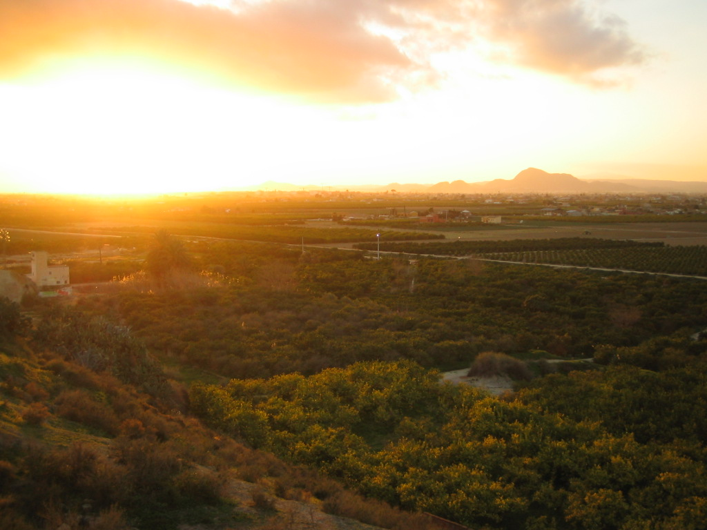 Huerta de Desamparados (Orihuela), en la zona de La Habana. Al fondo se puede apreciar la vecina Región de Murcia.